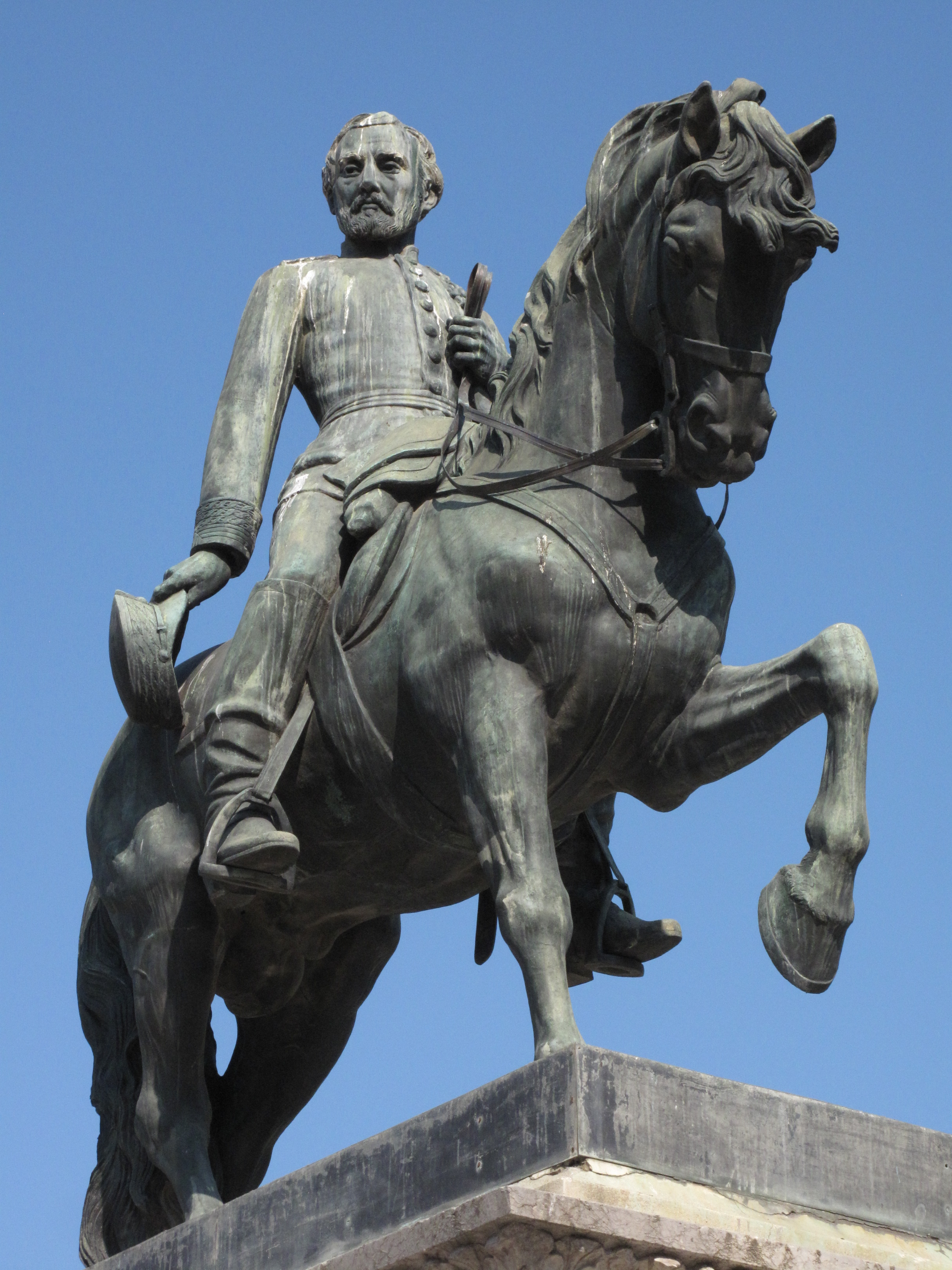 Estàtua eqüestre de bronze del general Prim al parc de la Ciutadella (Barcelona)